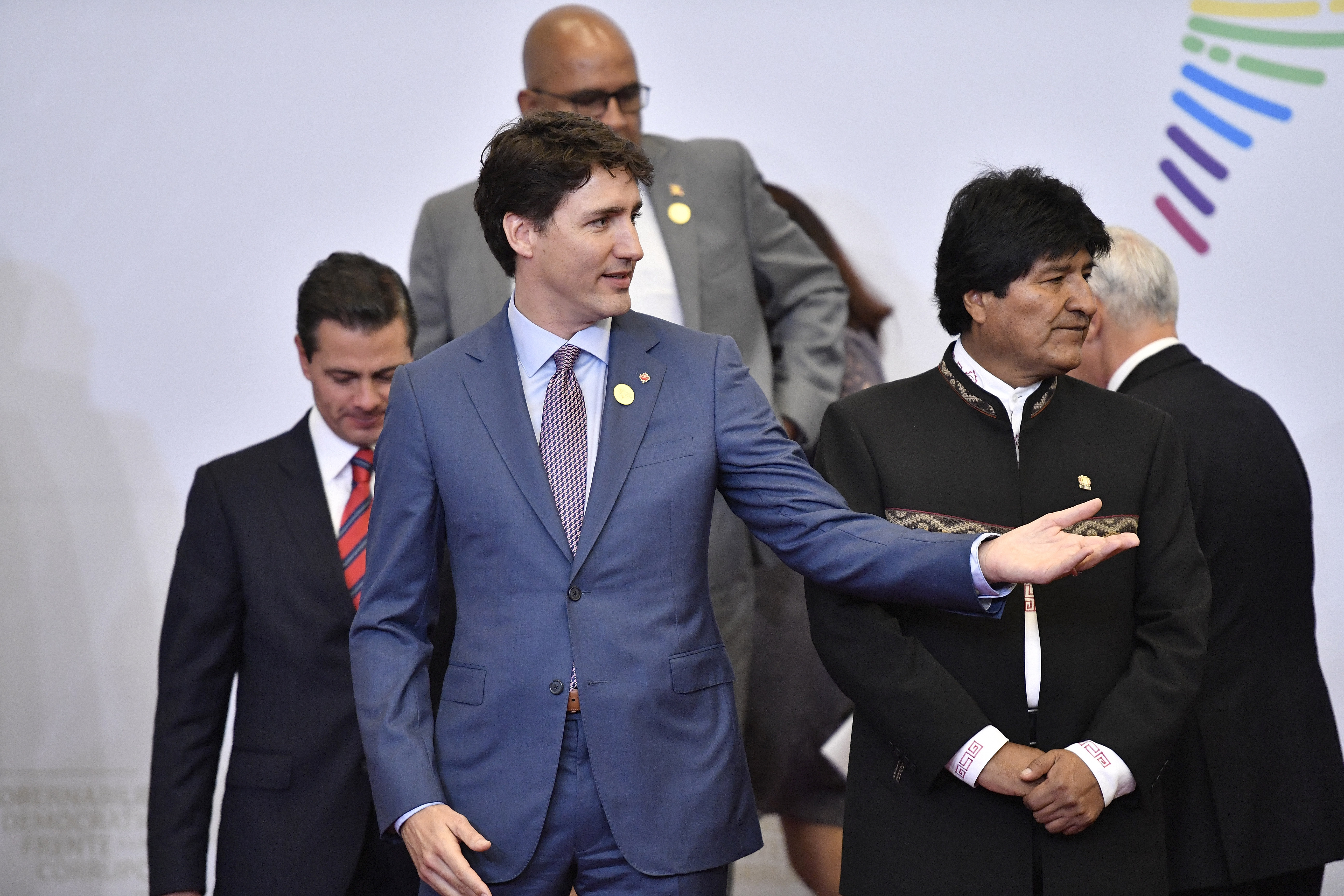 Foto Oficial de la VIII Cumbre de las Américas